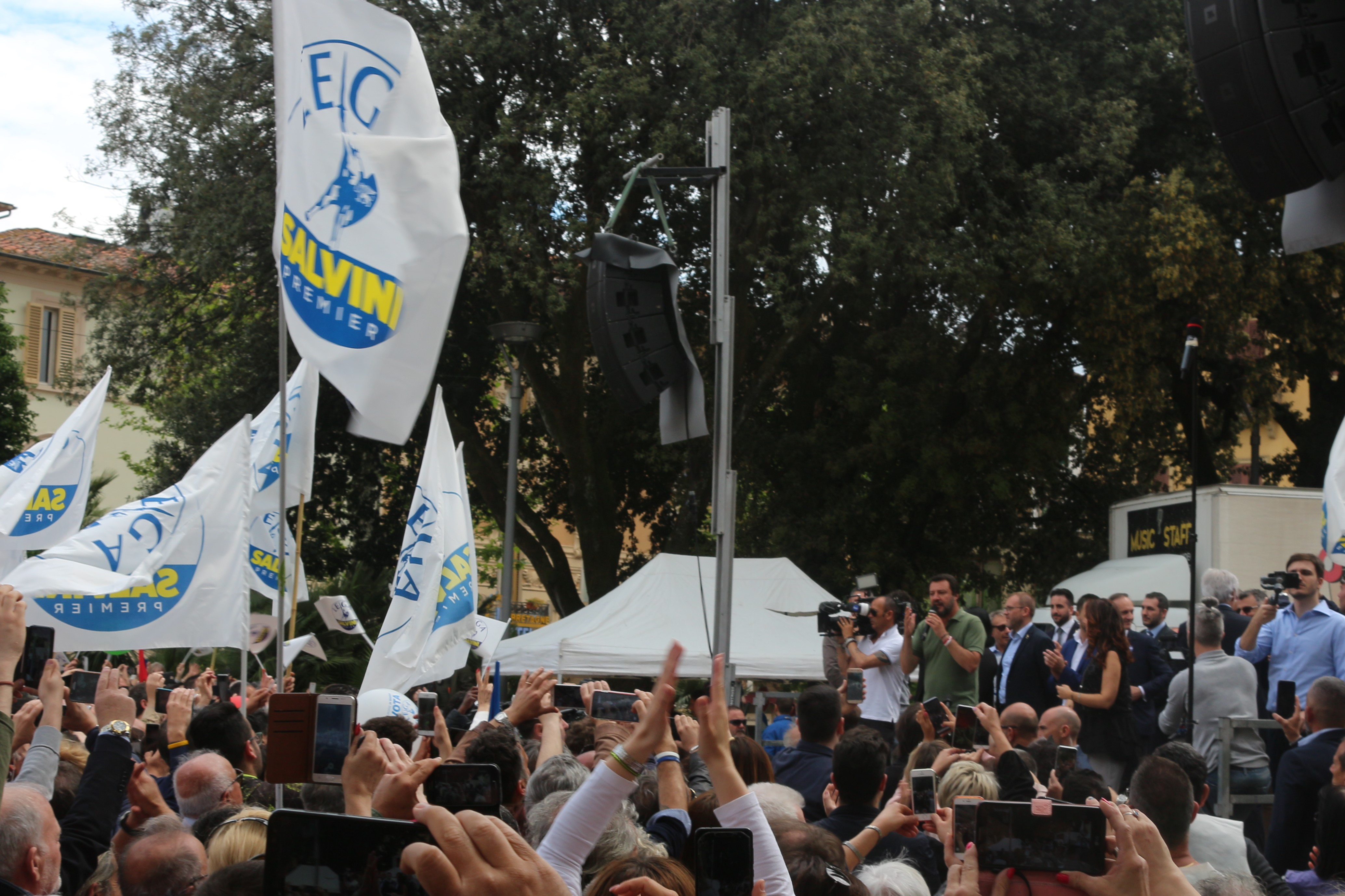 Comitato elettorale della Lega davanti alla Basilica di Montecatini Terme per le elezioni comunale ed europee di maggio 2019, con Matteo Salvini, Susanna Ceccardi (candidata nella circoscrizione Italia Centrale) e il candidato sindaco locale Luca Baroncini